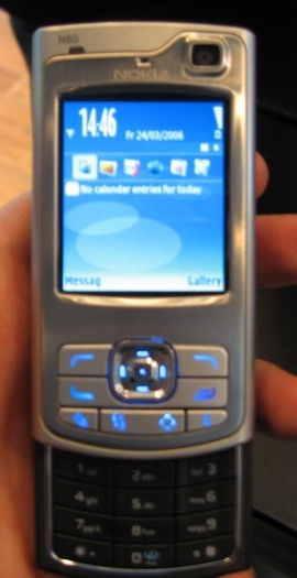 Nokia N80 mobile phoneN80